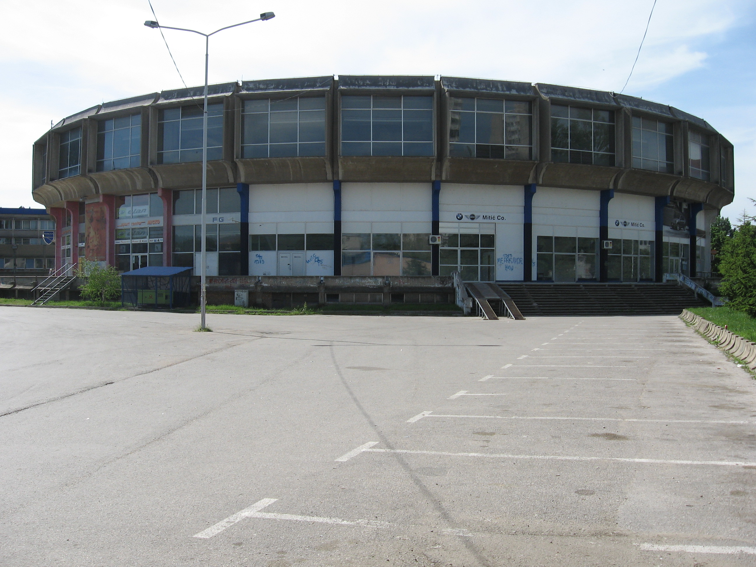 Hala Cair u Nisu. Snimljeno 2. maja 2010.